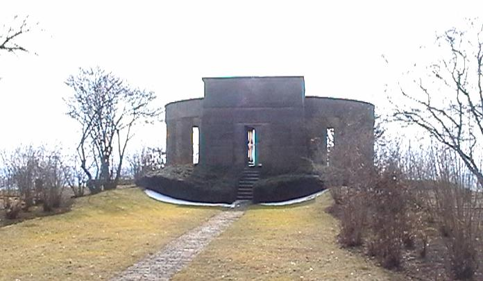 Ehrenfriedhof Daleiden, Landkreis Bitburg-Prüm.